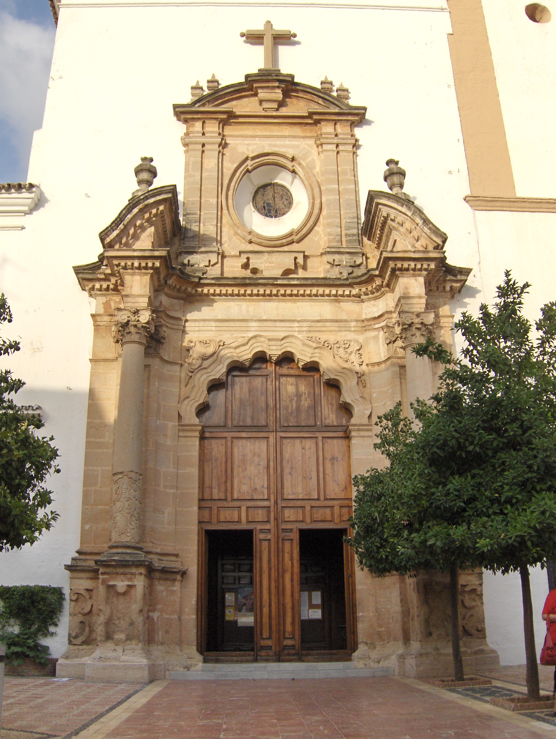 Iglesia de la Encarnación, Marbella, España